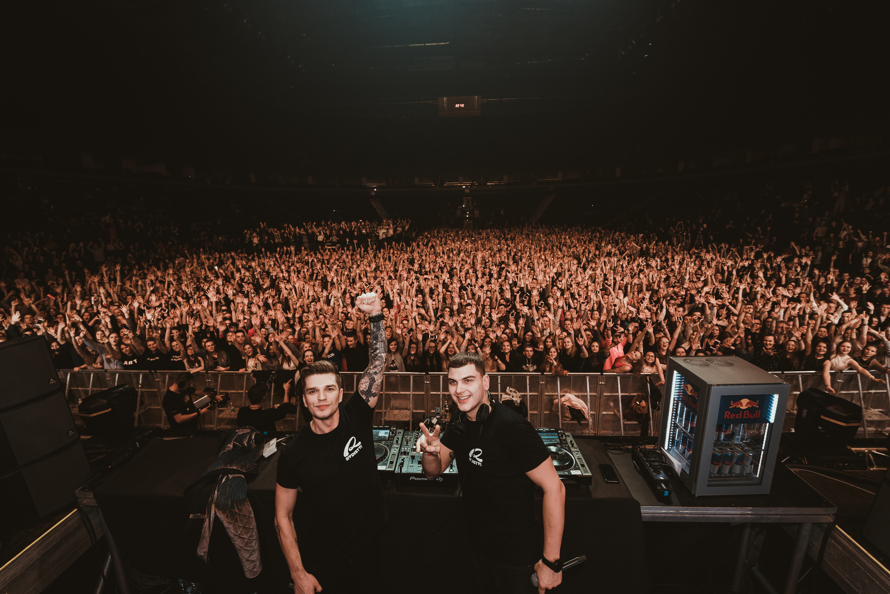 Radistų pasirodymas